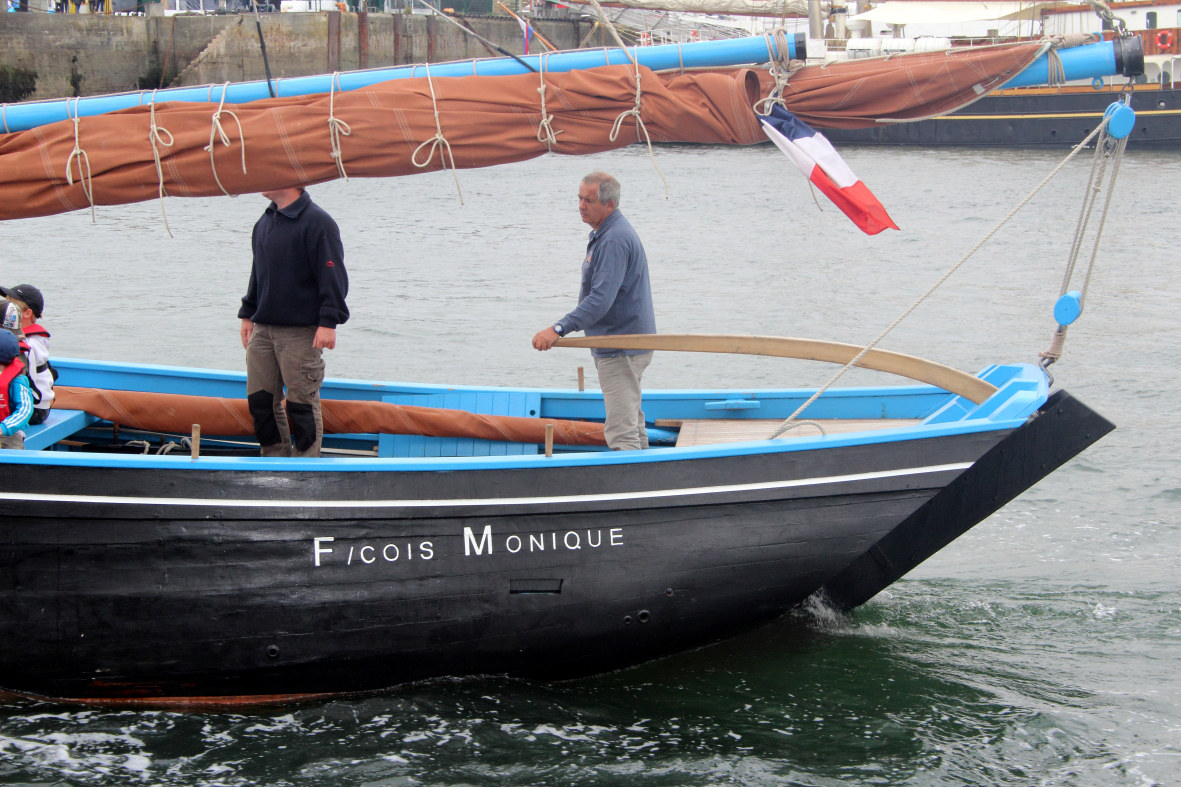 Gros plans sur les patronymes des bateaux traditionnels :François-Monique